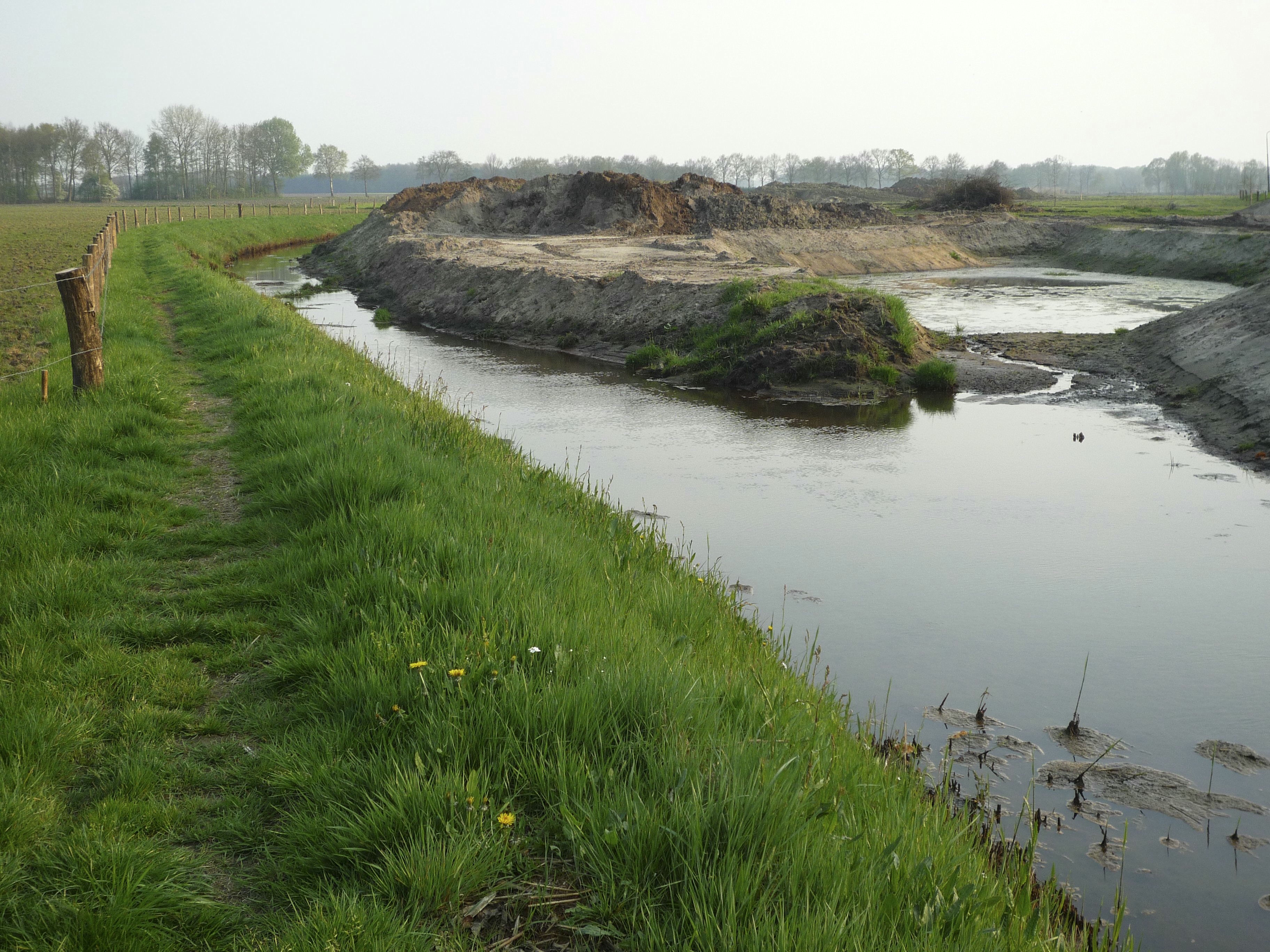 Beek De Kleine Beerze: Overzicht beekherstel (opmerking: Publicatie: De Acht Zaligheden (oude benaming) Archeologische Routes in Nederland)